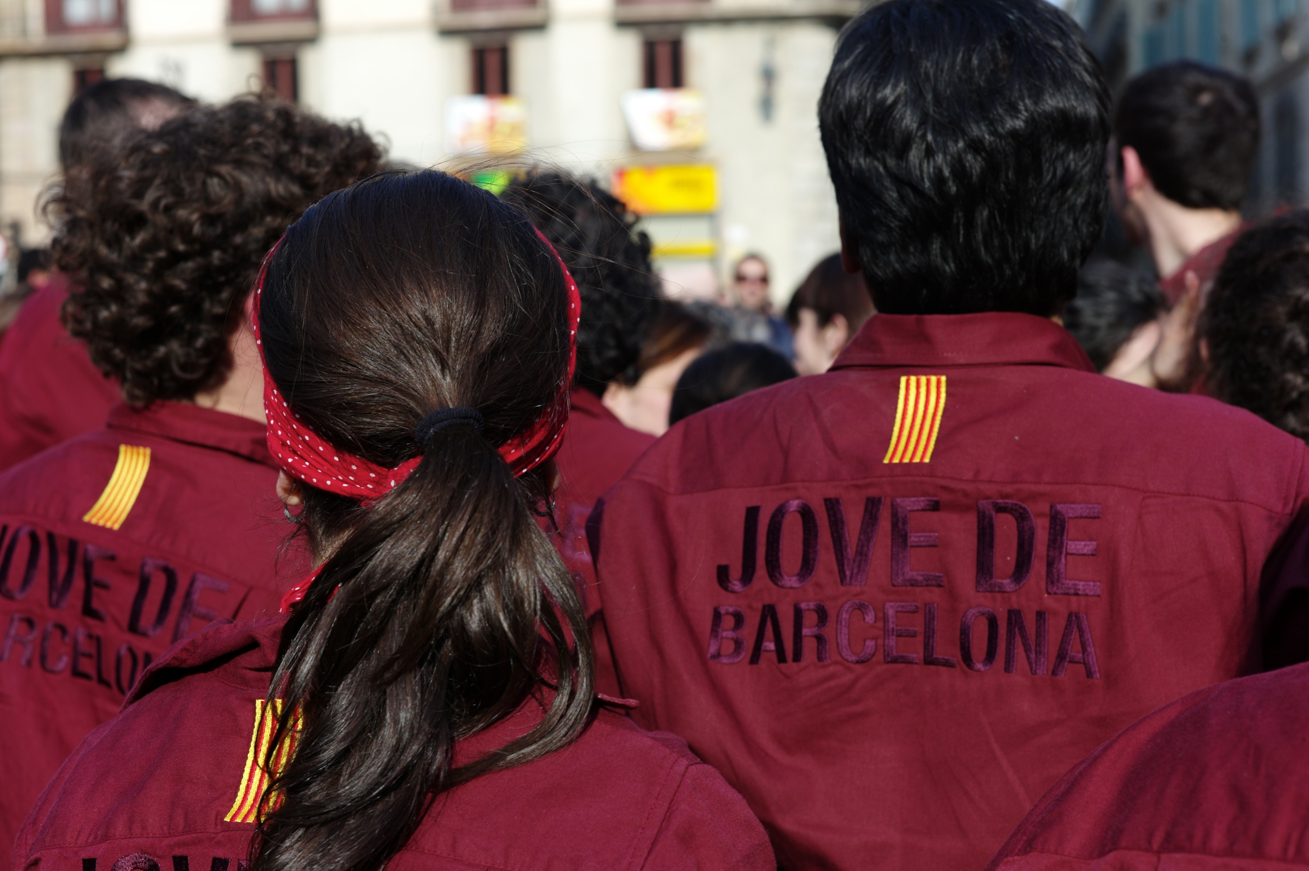 Camisa grana amb de la Colla Castellera Jove de Barcelona. Com podem veure porta el nom de la colla al darrera.